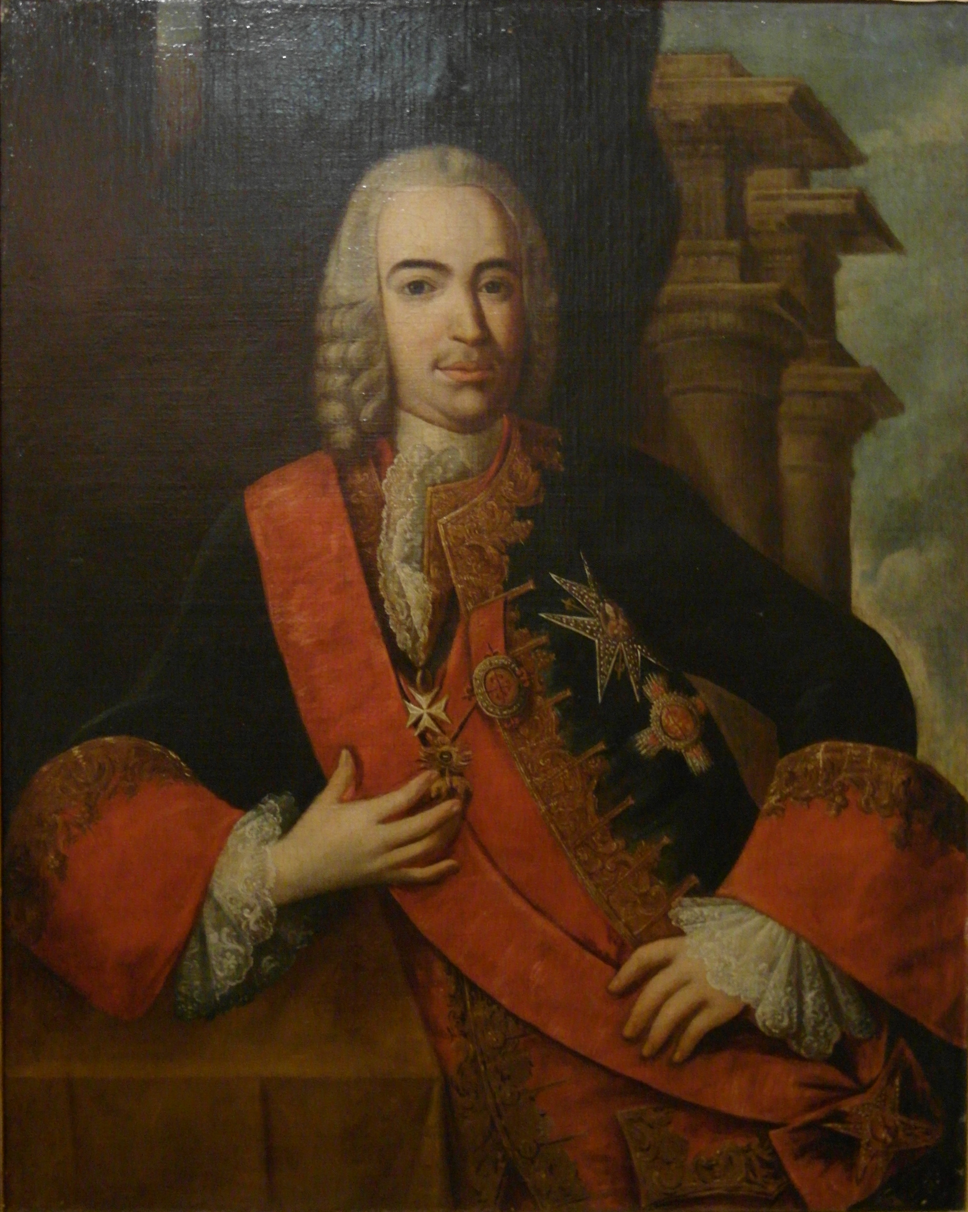 Retrato del estadista y politico ilustrado español Zenón de Somodevilla (1702-1781), que fue marqués de la Ensenada y llegó a ocupar los cargos de secretario de Hacienda, Guerra y Marina e Indias. Asimismo fue nombrado sucesivamente superintendente general de Rentas, lugarteniente general del Almirantazgo, secretario de Estado, notario de los reinos de España y caballero de la Orden del Toisón de Oro y de la Orden de Malta, siendo además consejero de Estado durante los reinados de Felipe V, Fernando VI y Carlos III de España. Esta obra es una copia anónima del siglo XVIII de un retrato del marqués ejecutado por el pintor italiano Jacopo Amiconi.